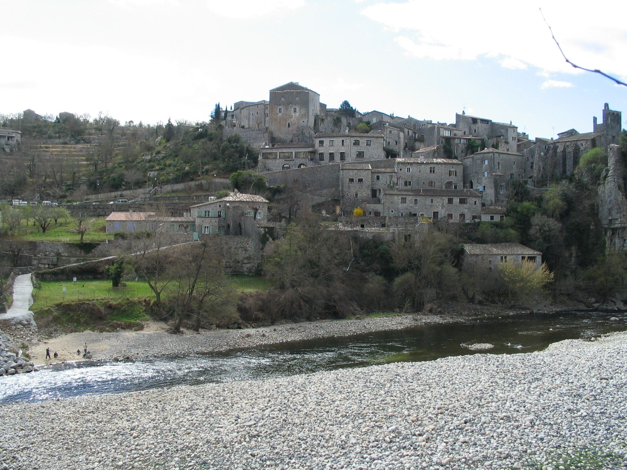 Balazuc im Ardèchetal